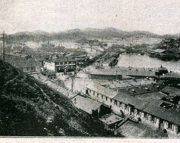 Vue du Port et des bassins de Port-Arthur